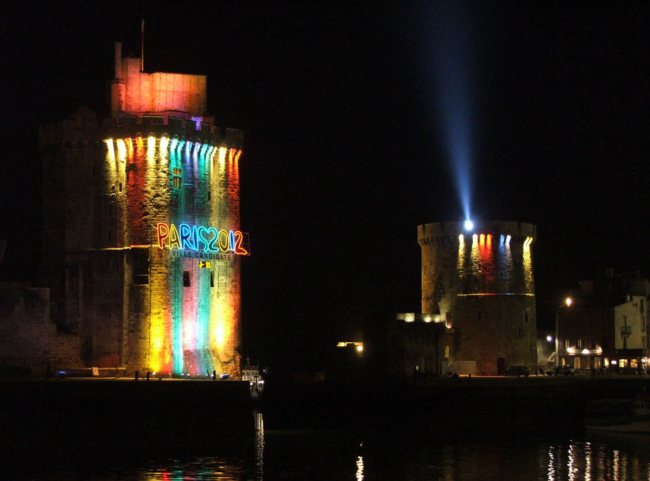 Les tours de La Rochelle pendant la candidature de Paris aux Jeux Olympiques de 2012.